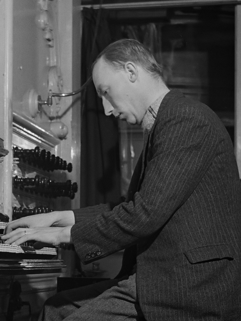 Albert de Klerk (1917-1998) aan de klavieren van het orgel in de Grote of Sint-Bavokerk te Haarlem, de kerk waar hij vanaf 1956 als stadsorganist fungeerde